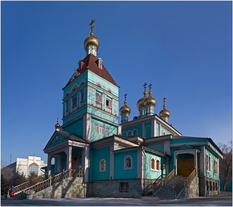 Свято-Никольский кафедральный собор г. Алма-Аты, Казахской ССР